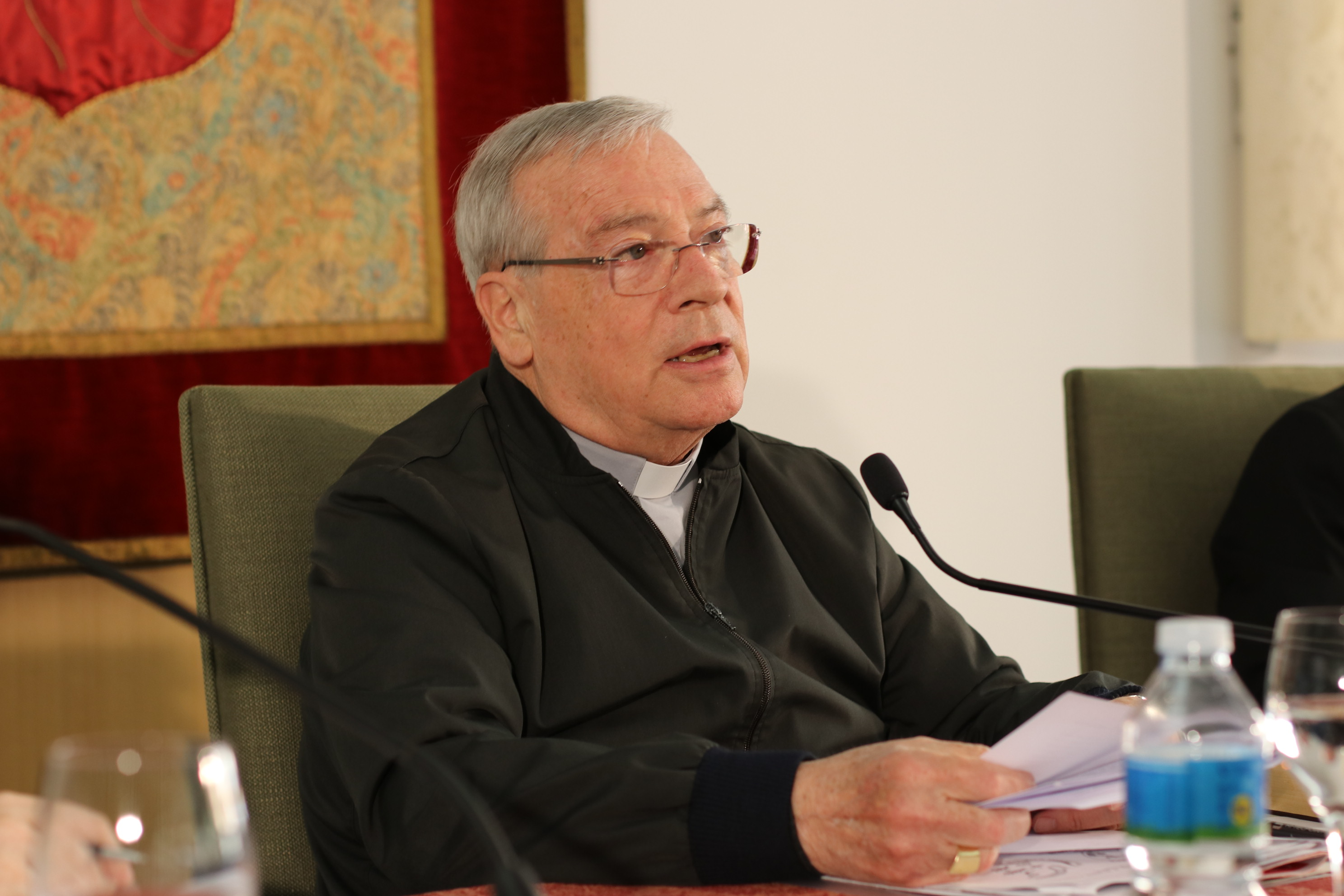 Agostino Marchetto a les Jornades Castelldaura del 2018.